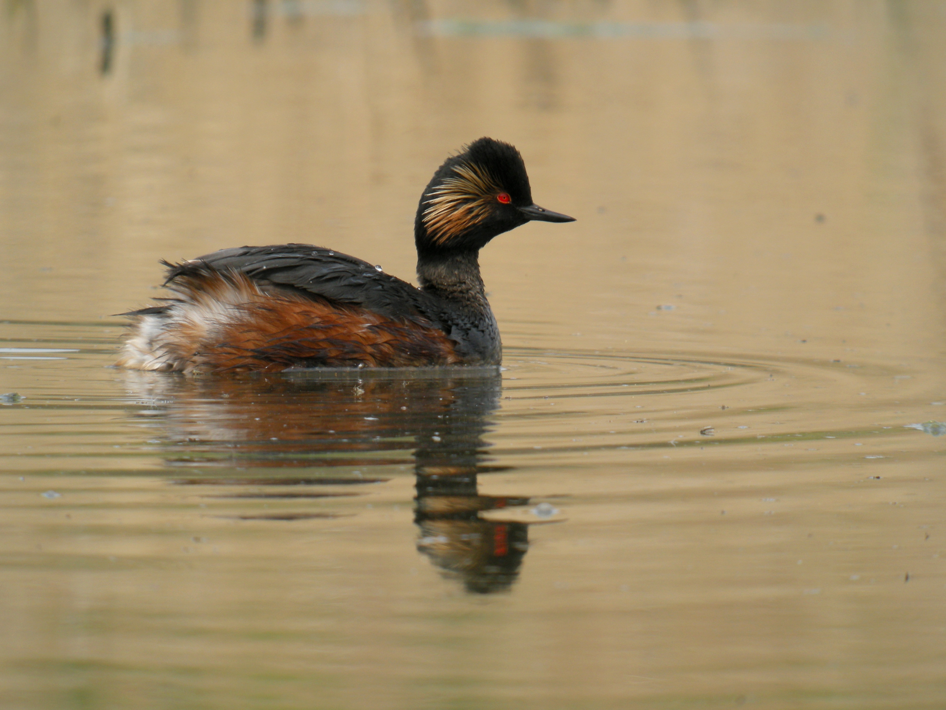 Podiceps nigricollis